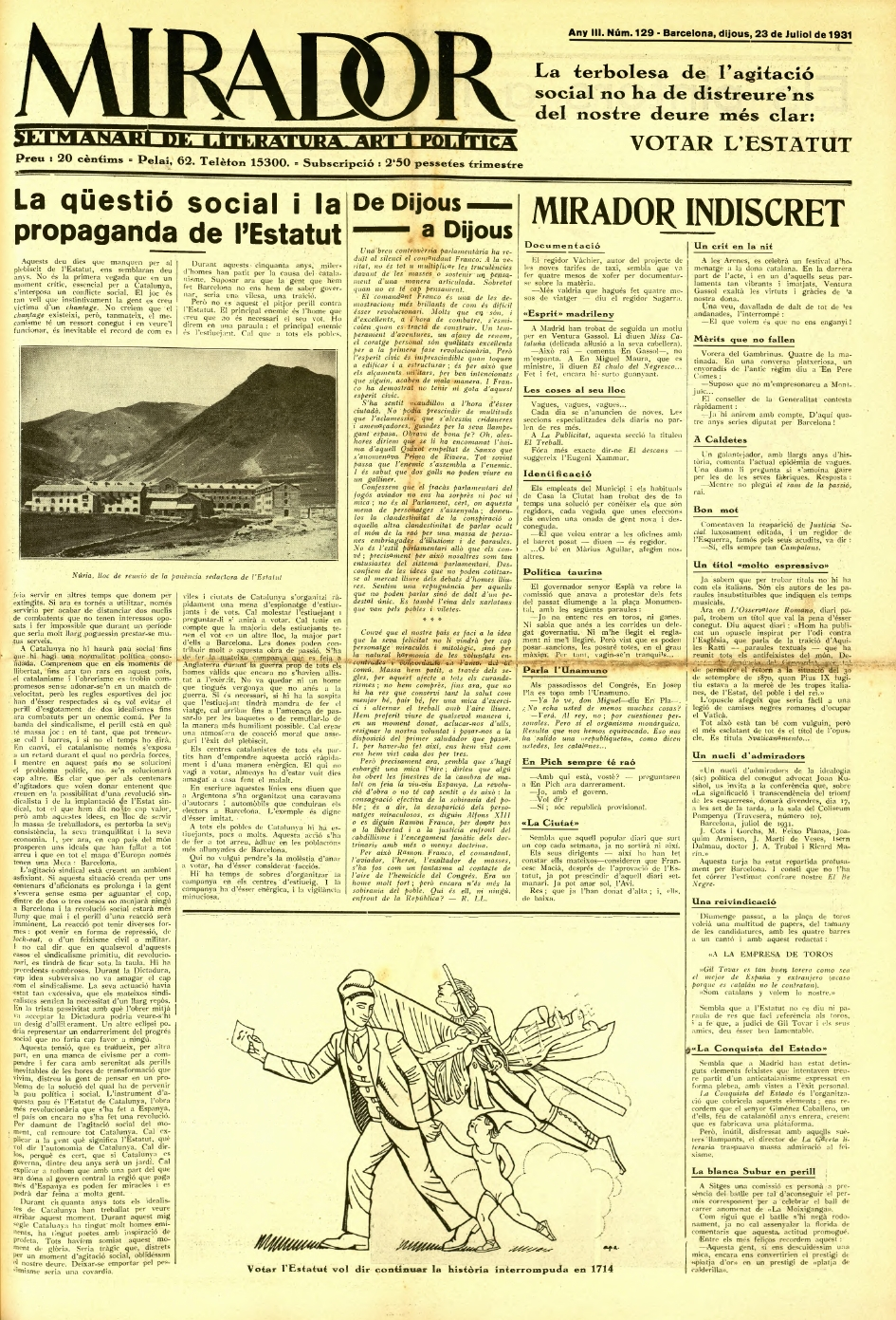 Portada de la revista Mirador del 23 d'abril de 1931